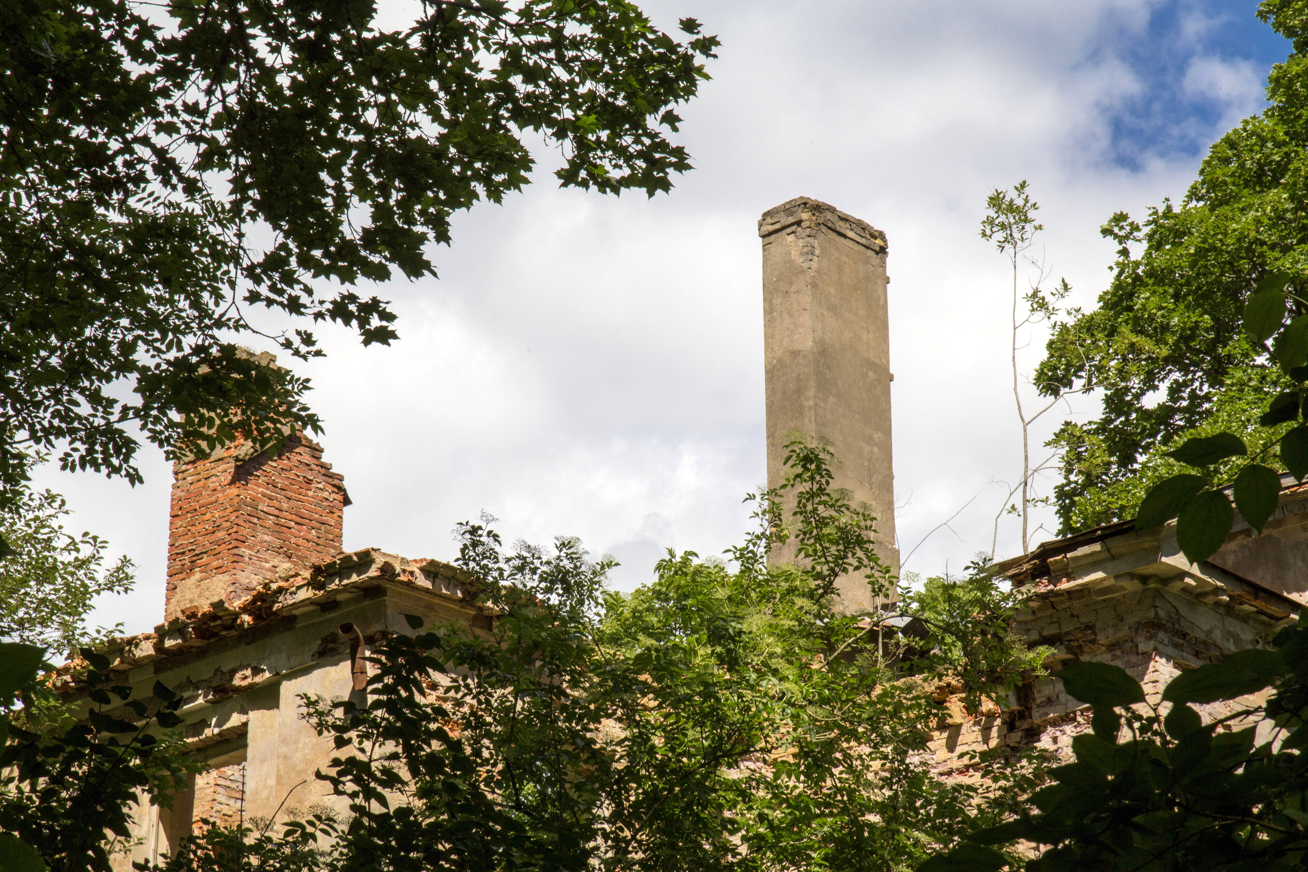 Popervāles muiža / manor